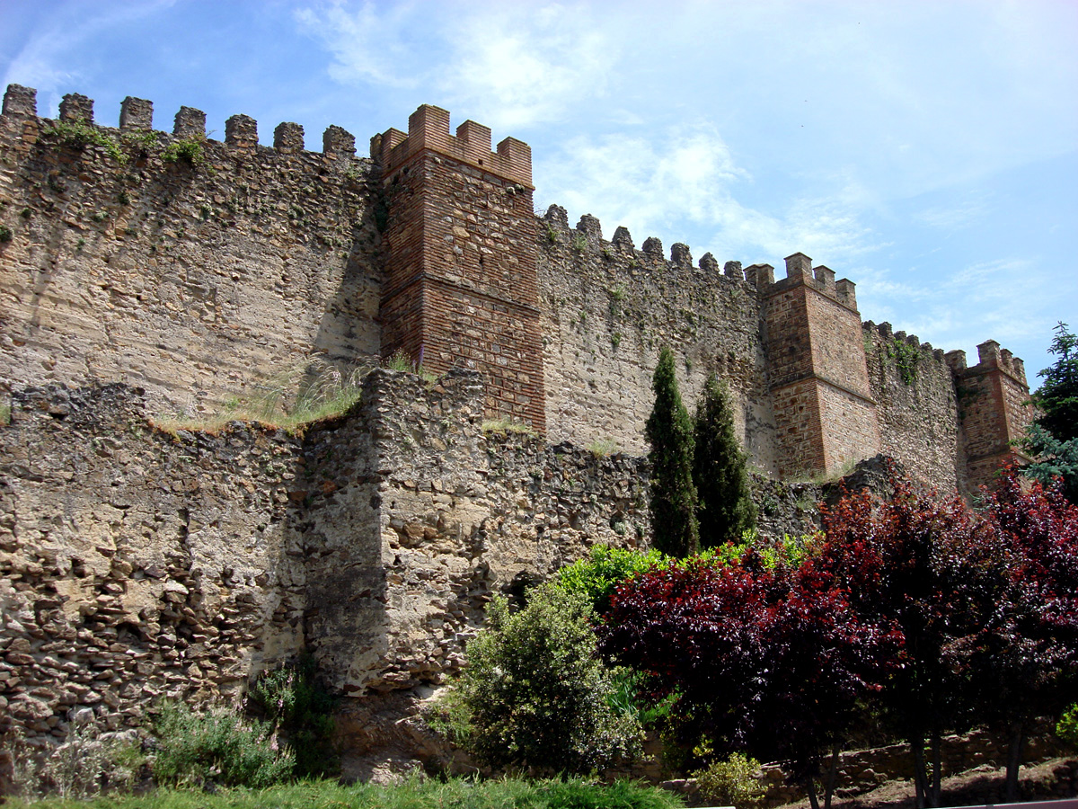 Lienzo suroeste del recinto amurallado de Buitrago del Lozoya. En él se observan tanto los torreones macizos como la barbacana.